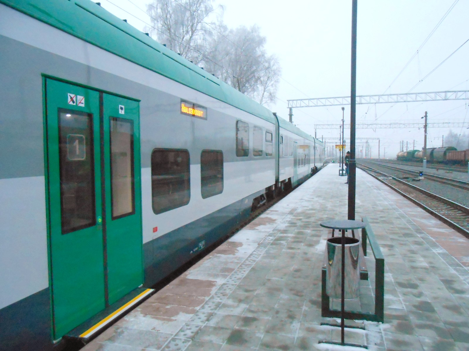 Дизель-поезд ДП3-001 (PESA 730M) на станции Смолевичи